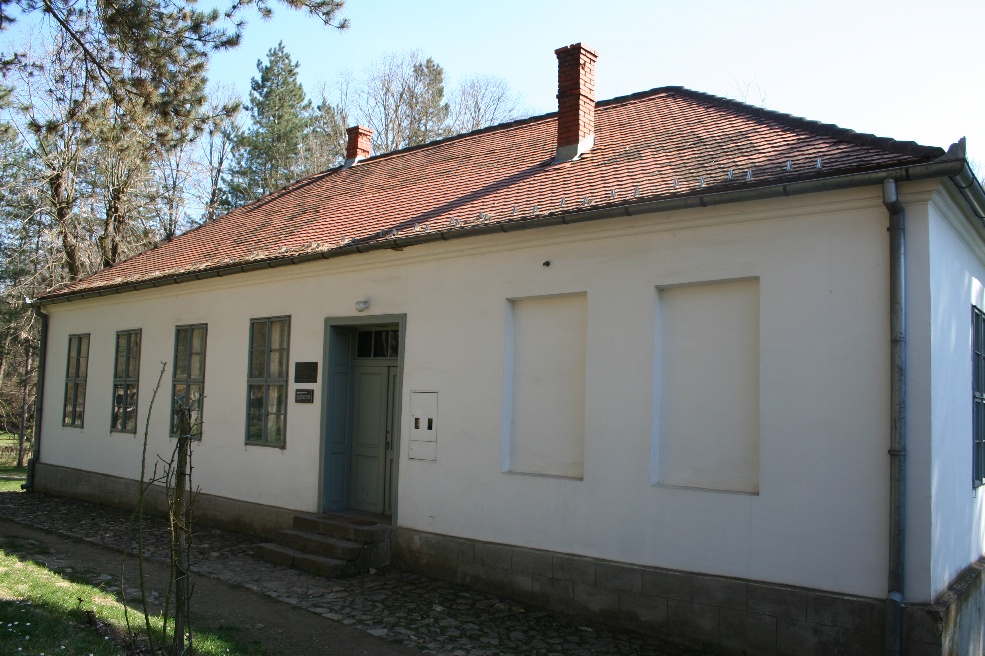 Desankina škola, Brankovina